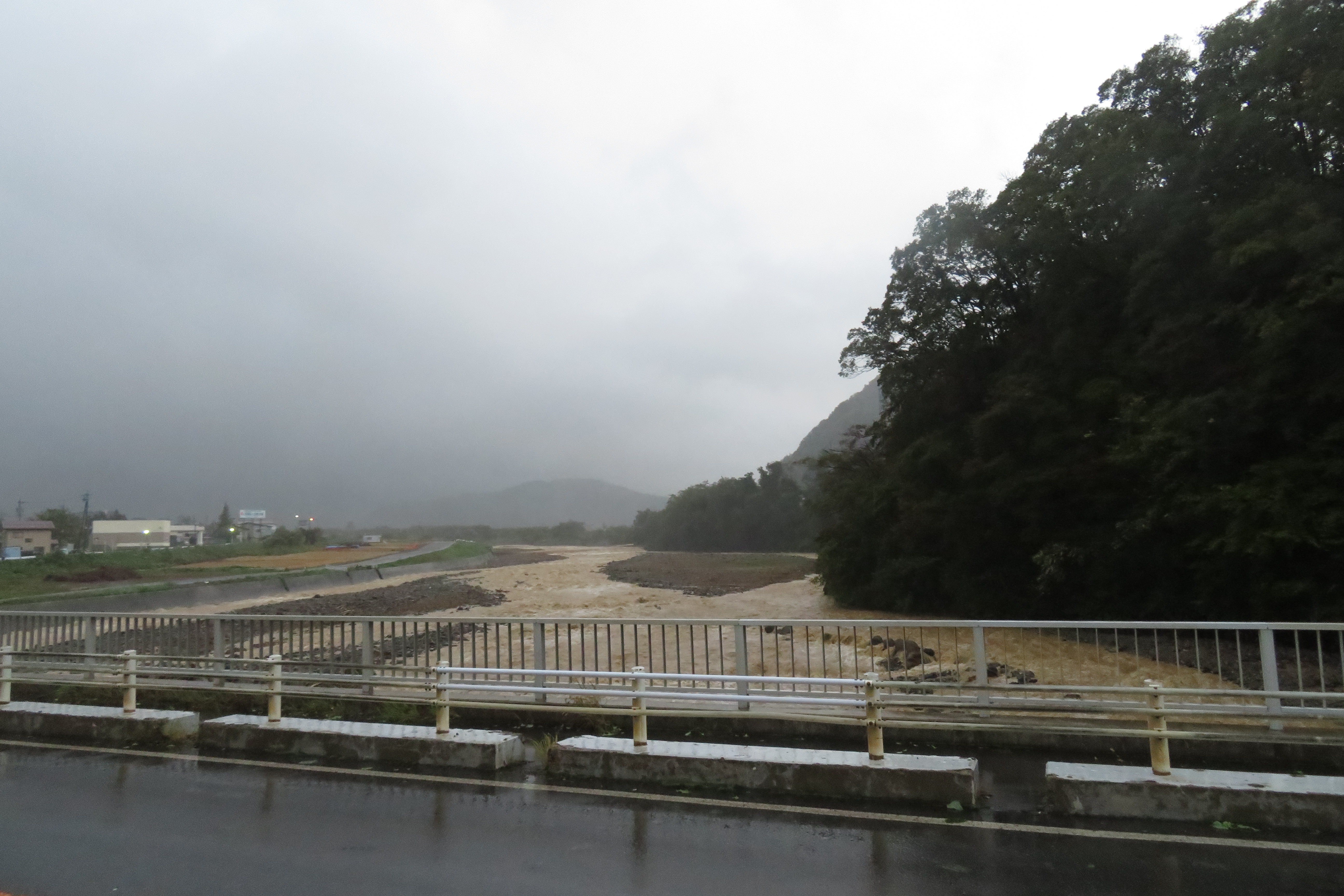 夜間瀬橋から見た上流の夜間瀬川（2019-10-13台風19号翌日撮影）